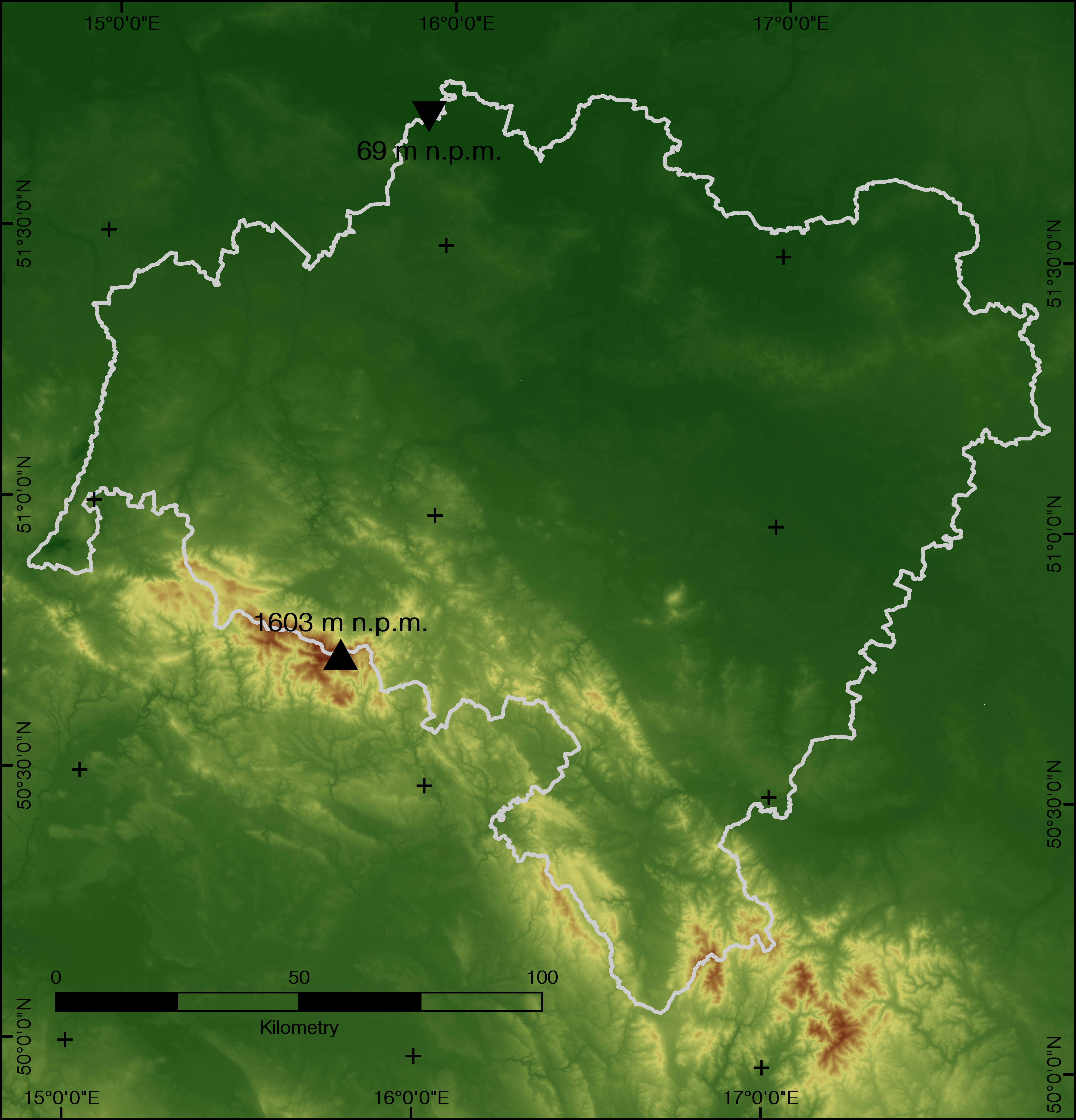 Topografia województwa dolnośląskiego